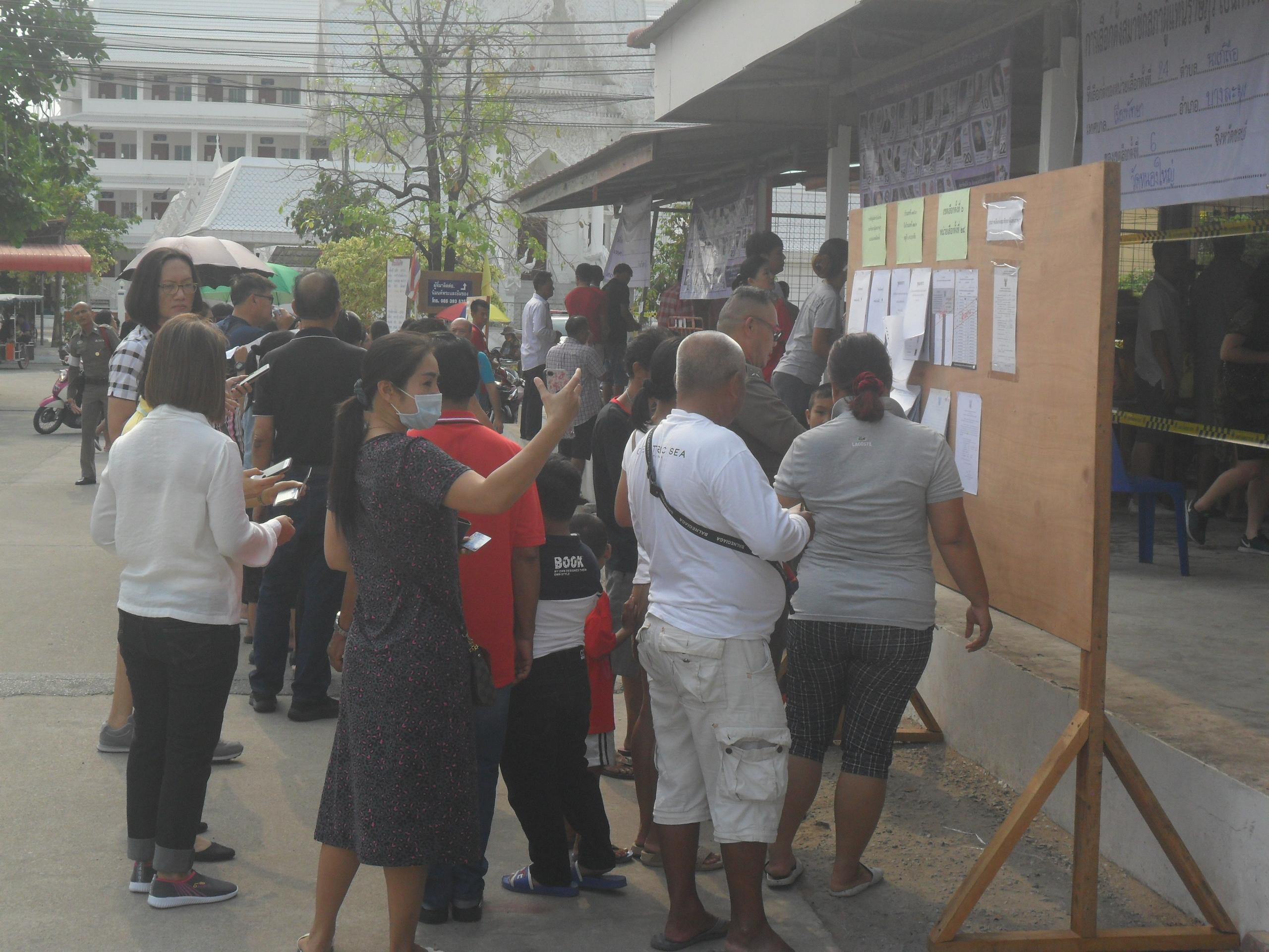 การเลือกตั้งสมาชิกสภาผู้แทนราษฎร พ.ศ. 2562 ในหน่วยเลือกตั้งที่ 25 เขตเลือกตั้งที่ 6 ณ วัดหนองใหญ่ ตำบลนาเกลือ อำเภอบางละมุง จังหวัดชลบุรี